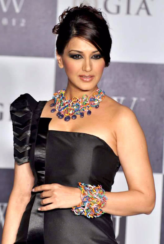 Sonali Bendre at IIJW 2012 Ramp Walk